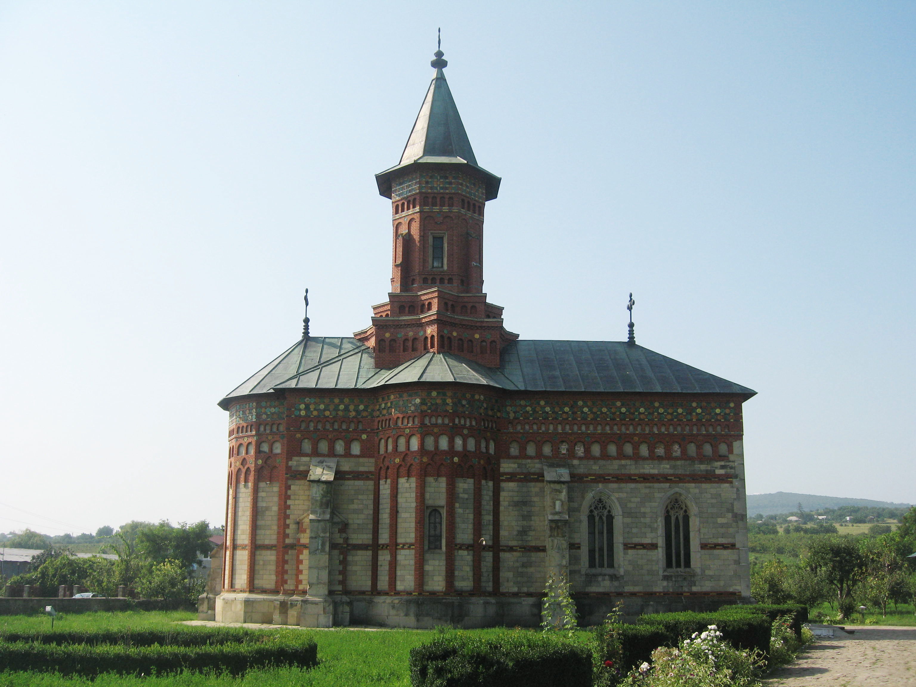 Biserica Sf. Gheorghe din Harlau